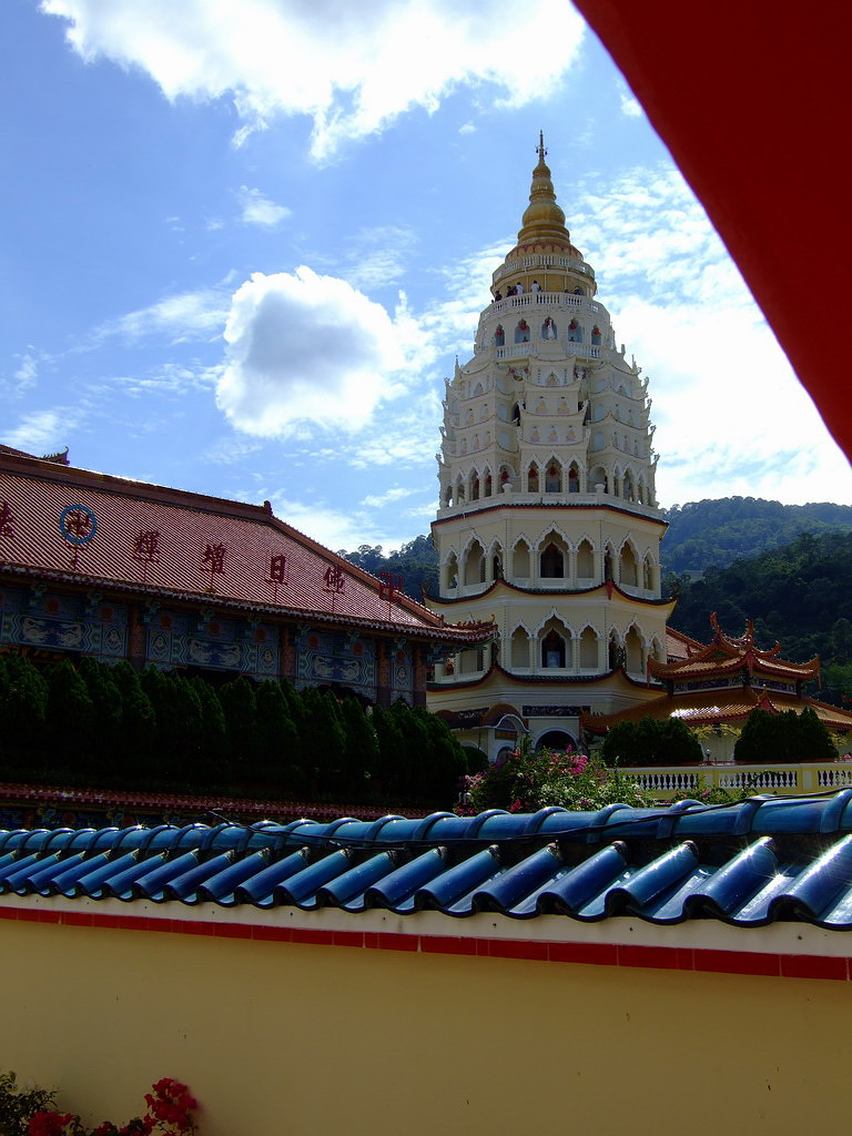 Georgetown - Penang - Malesia Tempio buddista di Kek Lok Si